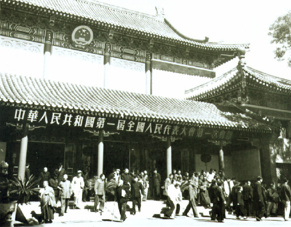 第一届全国人民代表大会第一次会议会场外景